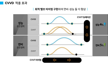 CVVD 기술이 적용되면, 성능과 효율을 최대한으로 끌어올릴 수 있다